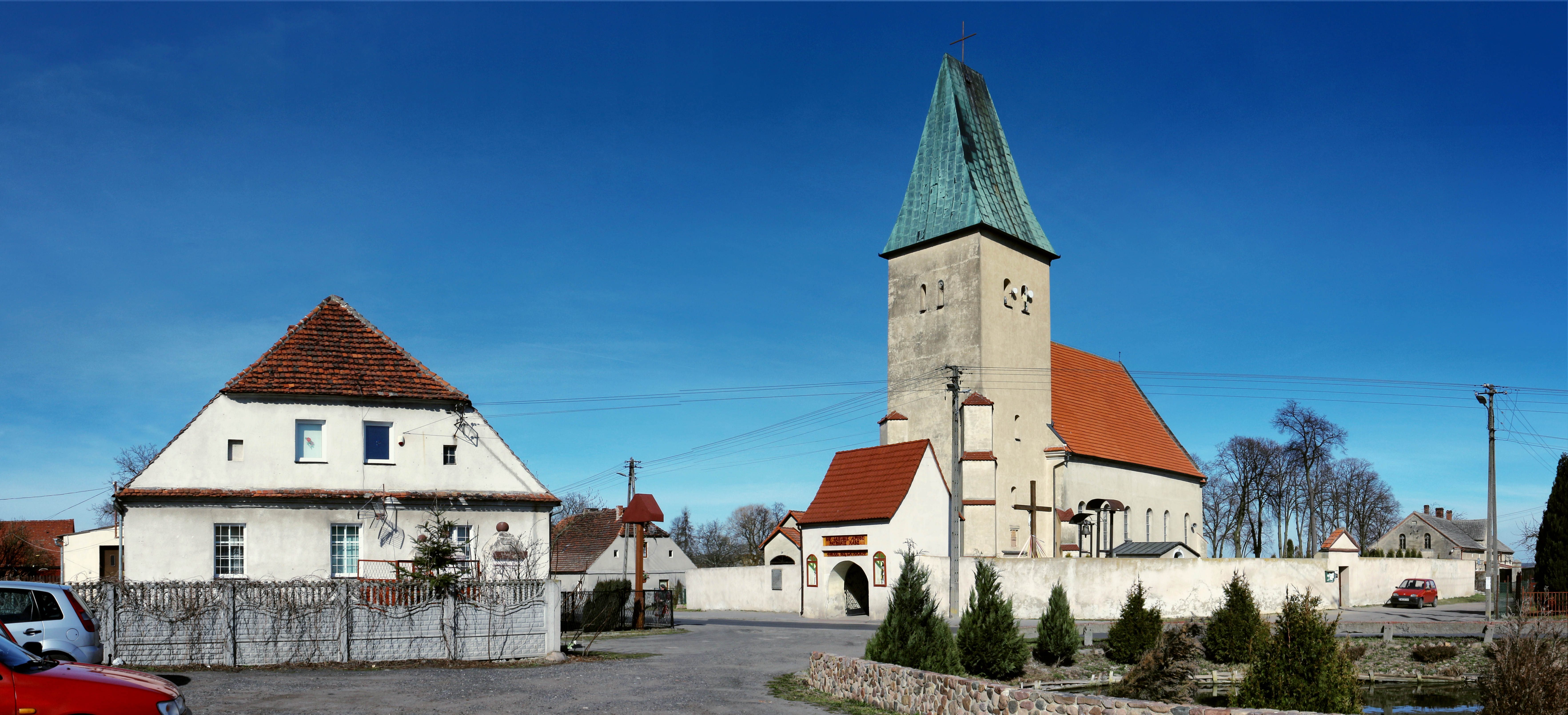 Konradowo, kościół i plebania